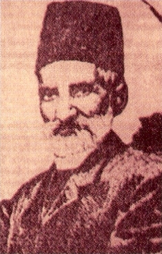 Hamparsum Limonciyan